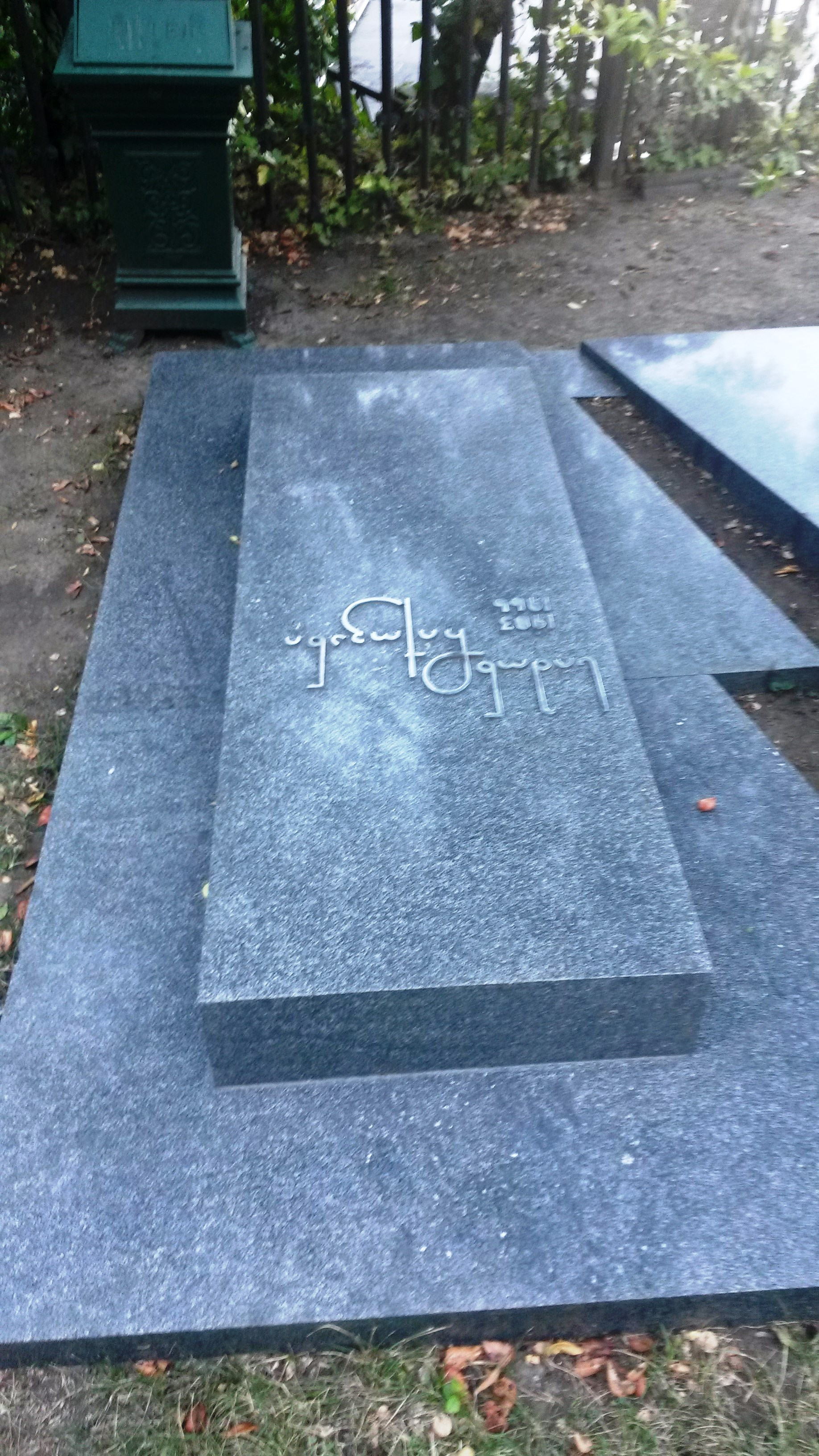 სიმონ ჩიქოვანი